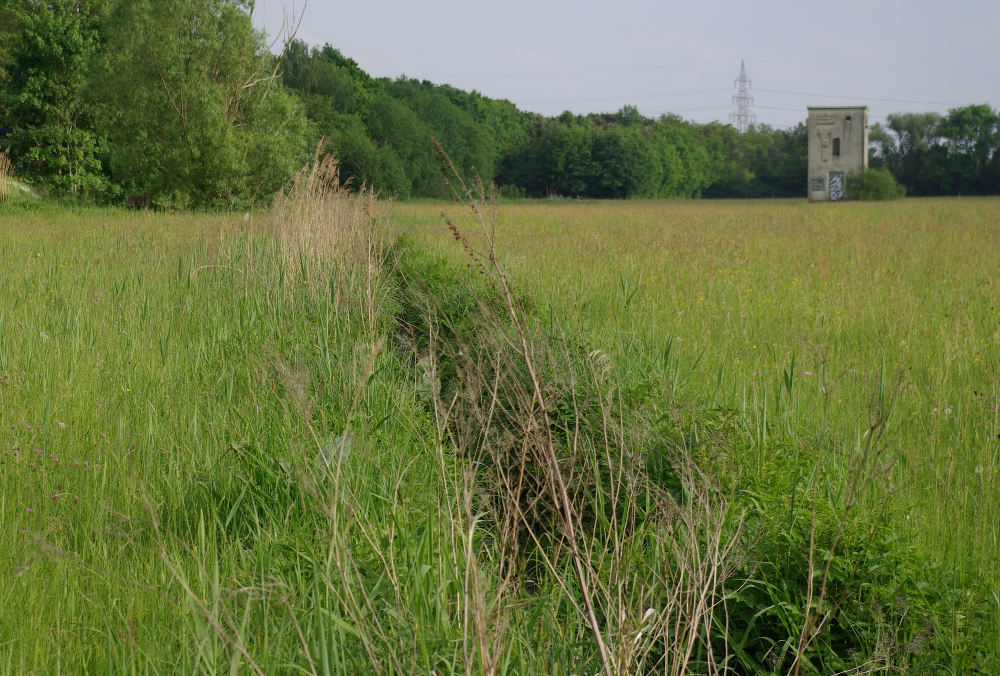 Der Langenaugraben zwischen Stählin-Biotop und Regnitz zwischen den Erlanger Stadtteilen Eltersdorf und Bruck